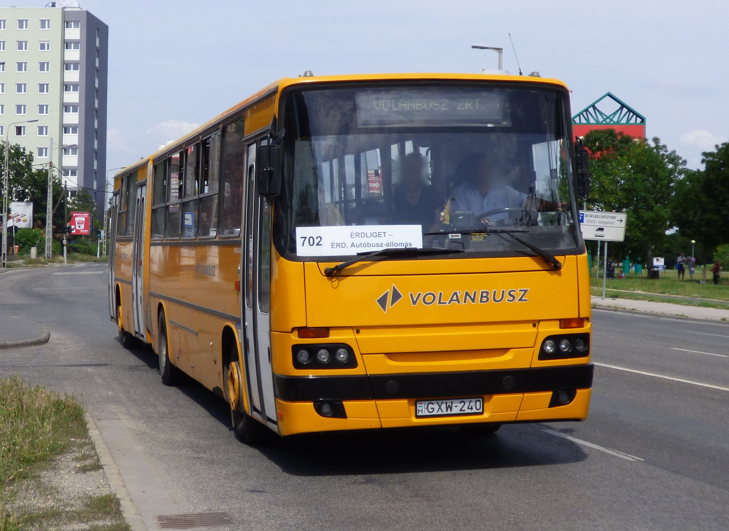 702-es jelzésű Ikarus C80-as vonatpótló busz a Nagytétényi úton (frsz. GXW-240)